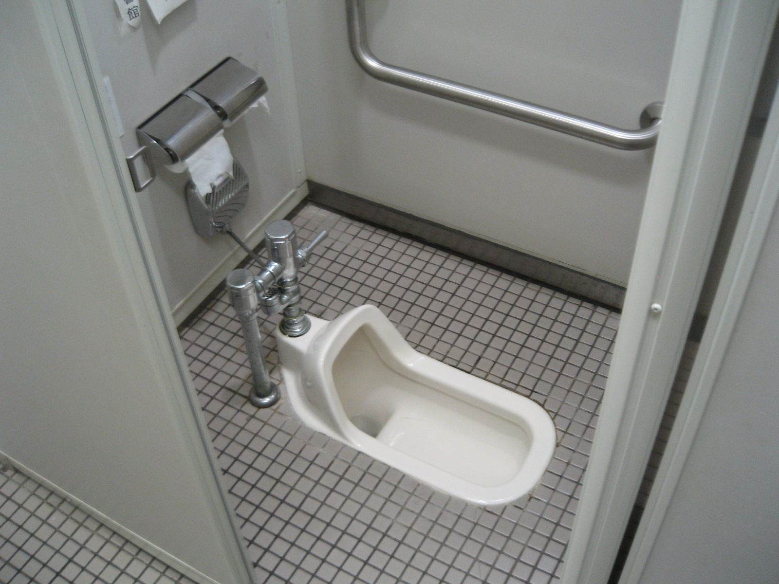 Toilet in Tokyo